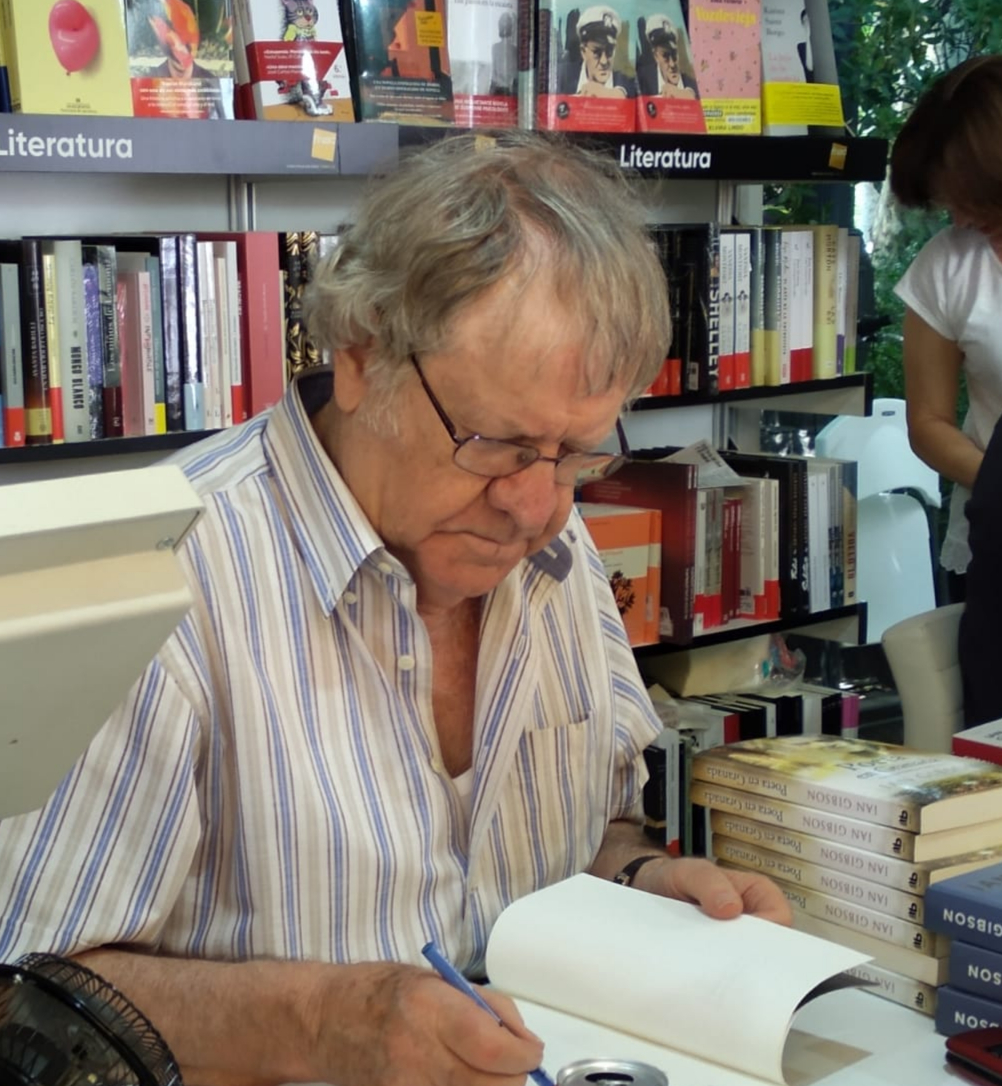 Ian Gibson firmando un ejemplar en la Feria del Libro de Madrid de 2019.